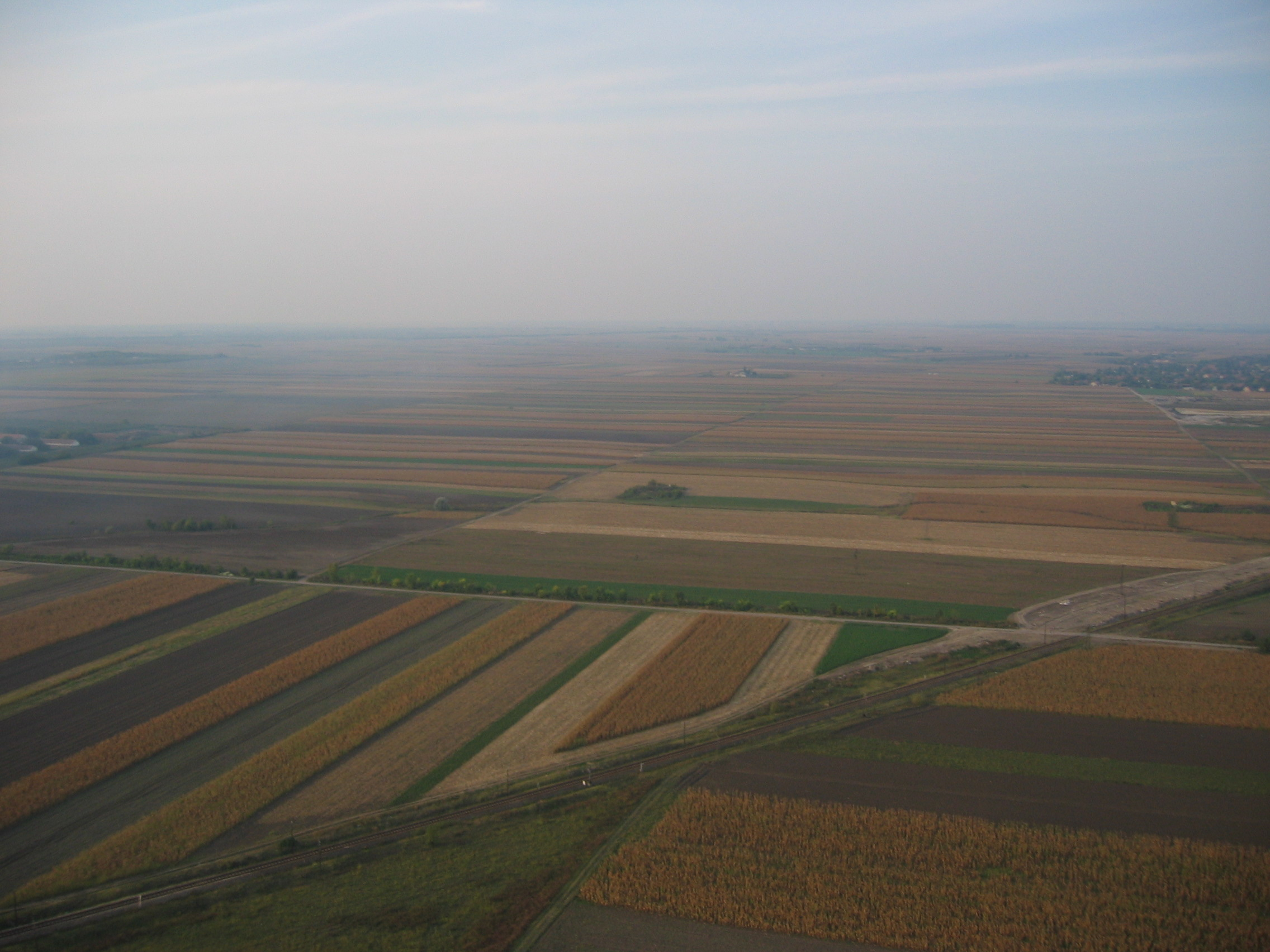 Country outside of Subotica (Serbia).